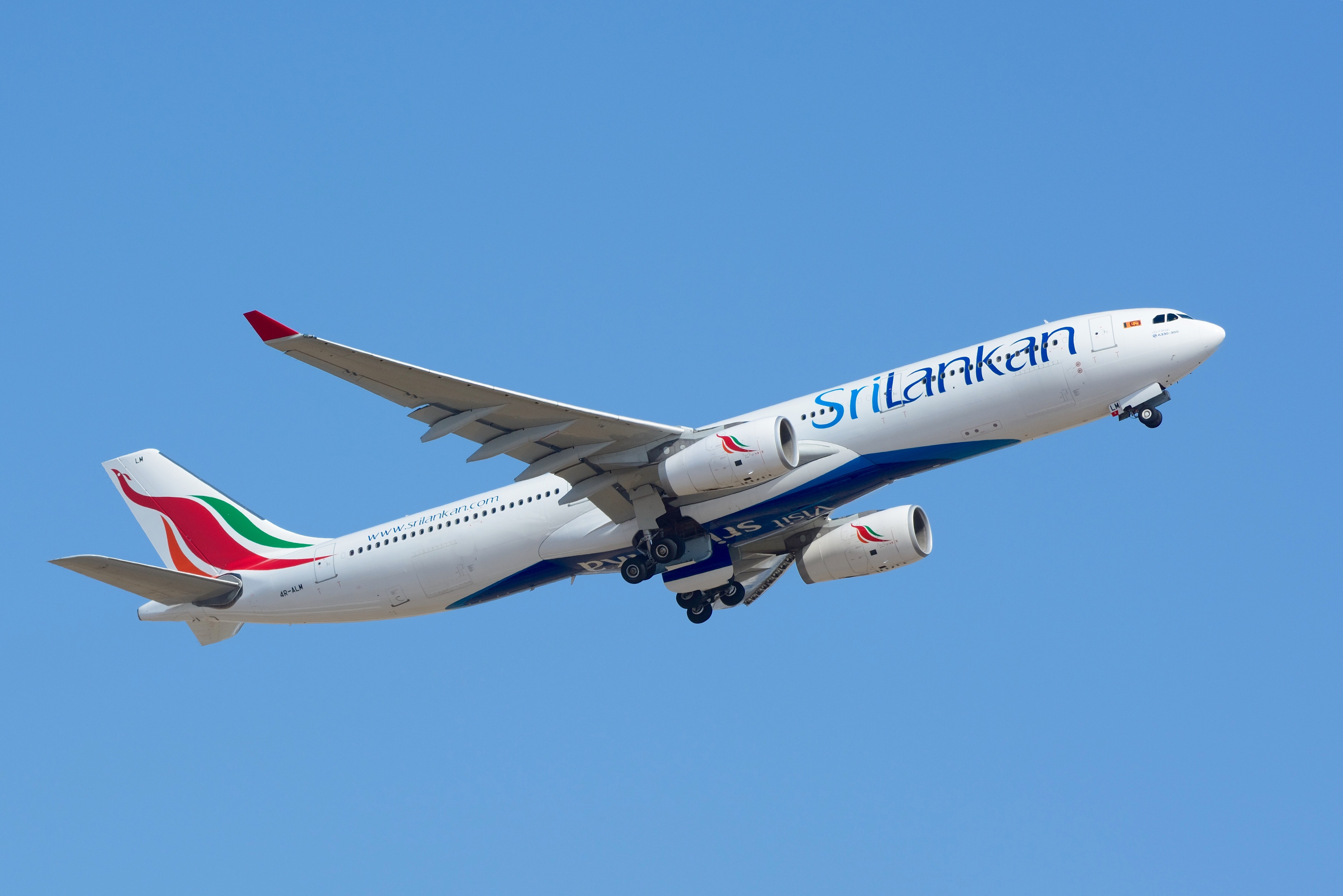 Srilankan Airlines, Airbus A330-300 4R-ALM NRT